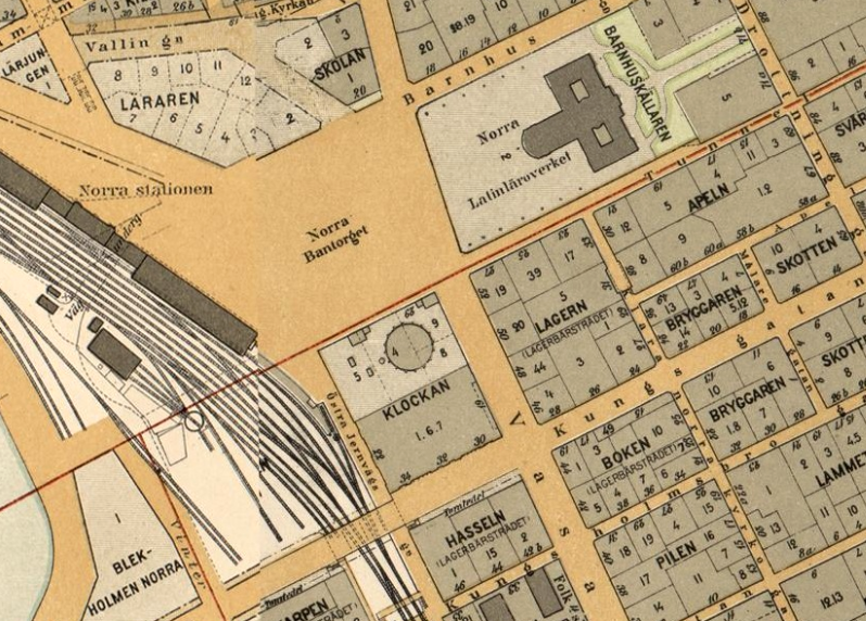 Del av 1899 års karta över Stockholm med Norra Bantorget och omgivning